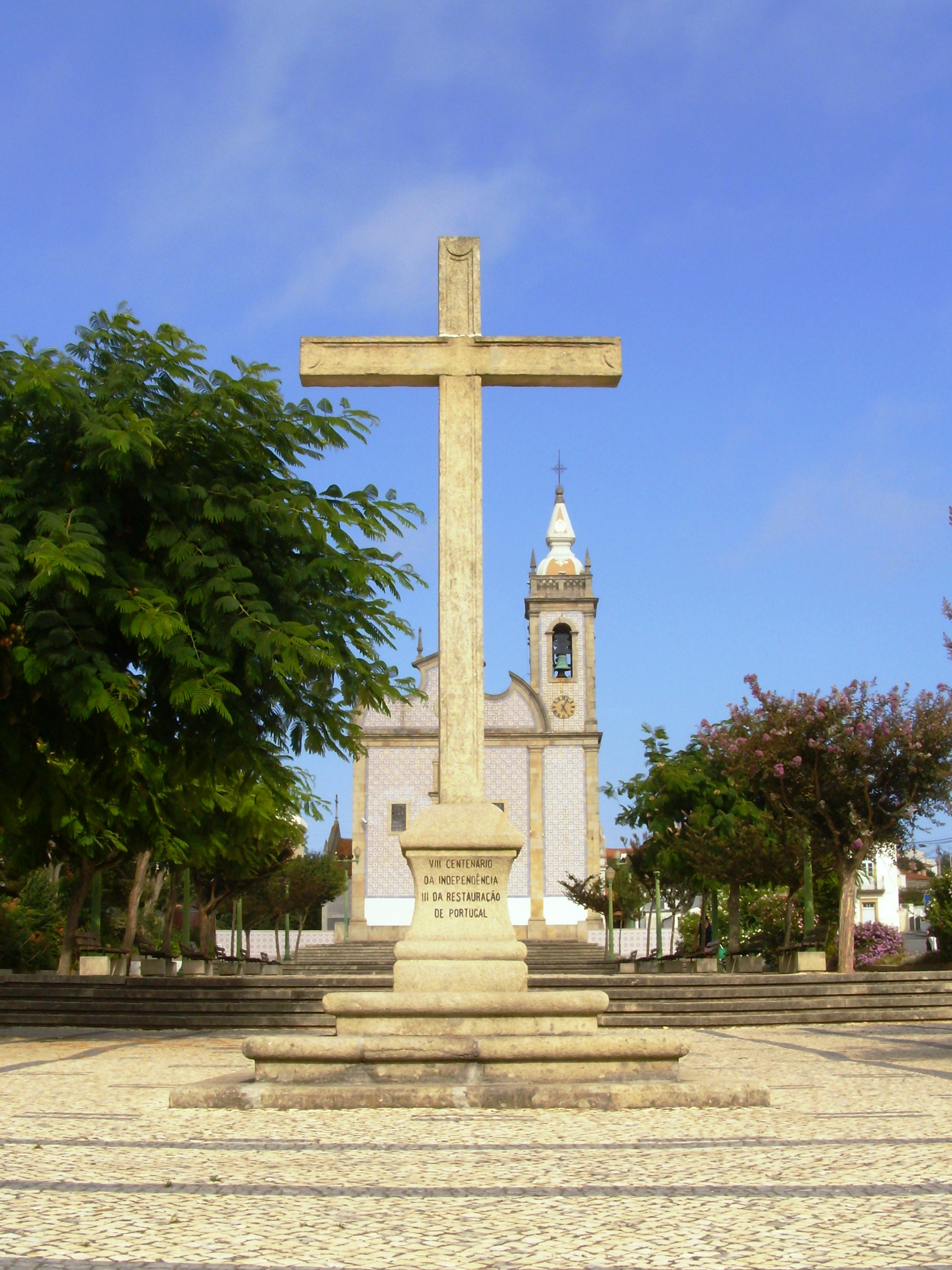 Monumento ao VIII Centenário da Independência, III da Restauração de Portugal, Esmoriz, concelho de Ovar, distrito de Aveiro, Portugal.